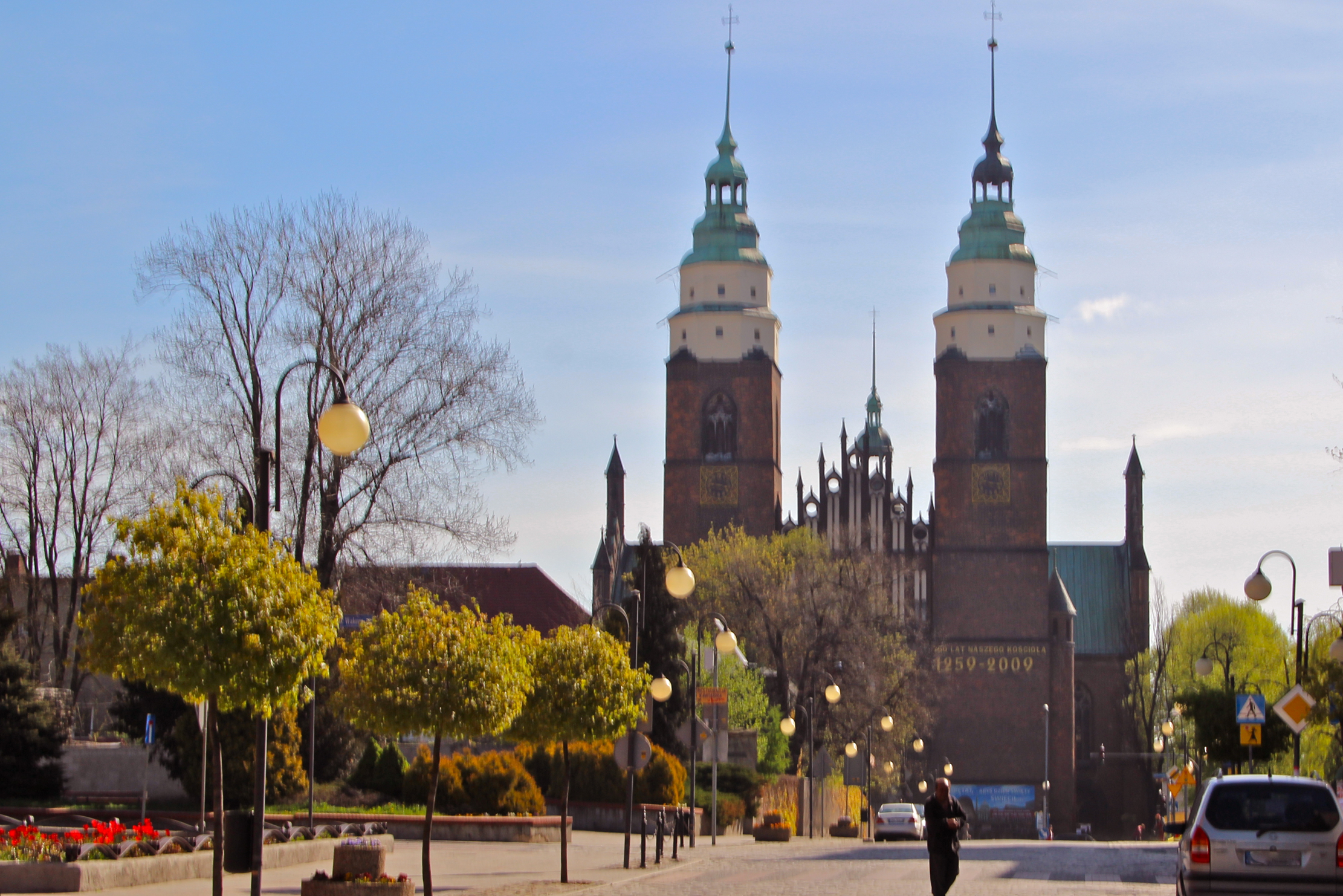 Głubczyce - kościół pw. Narodzenia Najświętszej Marii Panny.